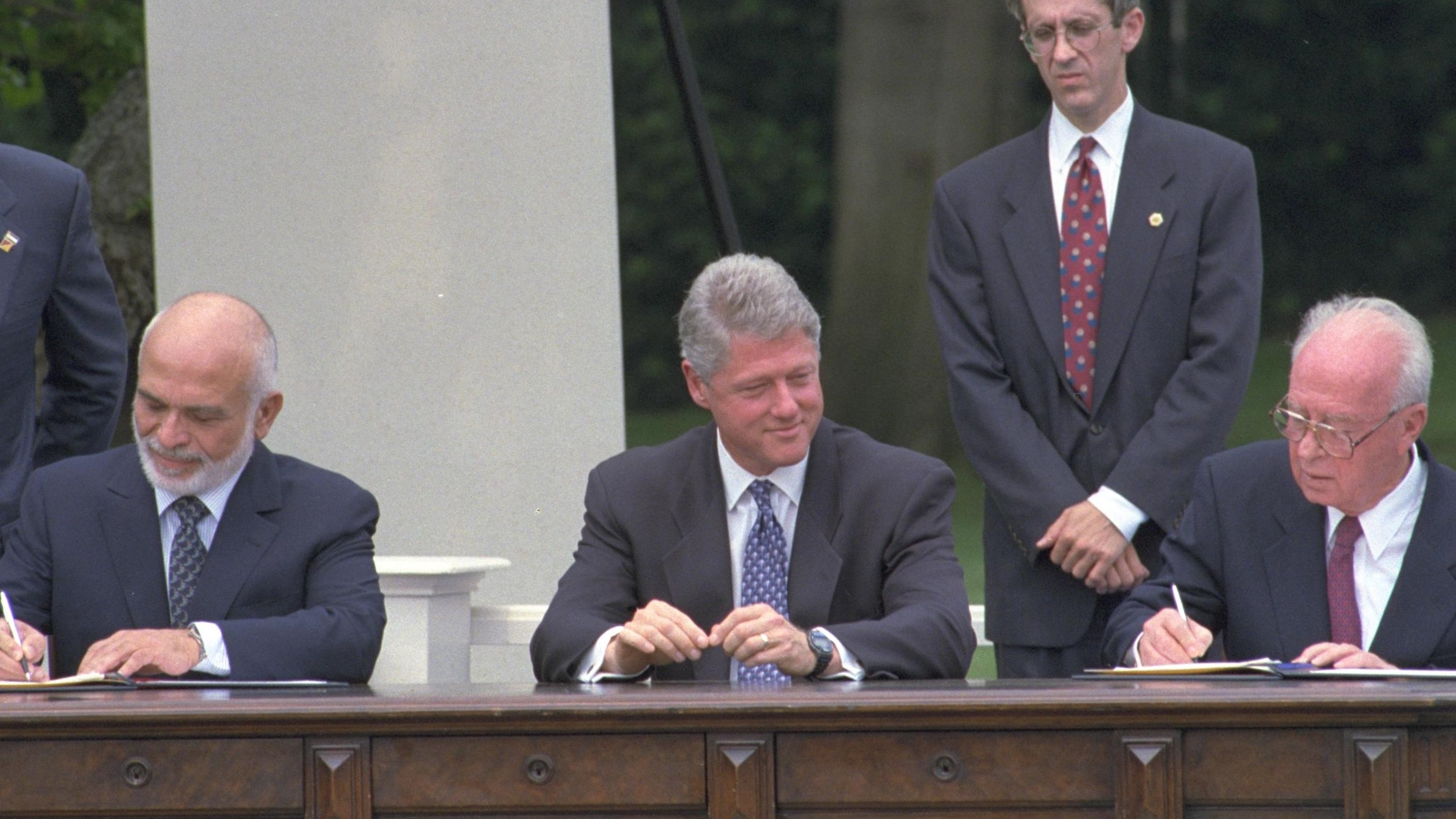 Prime Minister Yitzhak Rabin and Jordan's king Hussein sign the Washington Agreement on the White House Lawn as U.S. President Bill Clinton watches. חתימת חוזה השלום בין ישראל לירדן על מדשאת הבית הלבן בוושינגטון, ארצות הברית. בצילום, נשיא ארה"ב ביל קלינטון (מרכז) מביט על ראש הממשלה יצחק רבין וחוסיין מלך ירדן (משמאל) החותמים על הסכם השלום בין המדינות. প্রধানমন্ত্রী রবিন এবং জর্ডানের রাজা কিং হোসাইন শান্তি চুক্তি স্বাক্ষর করেছেন.